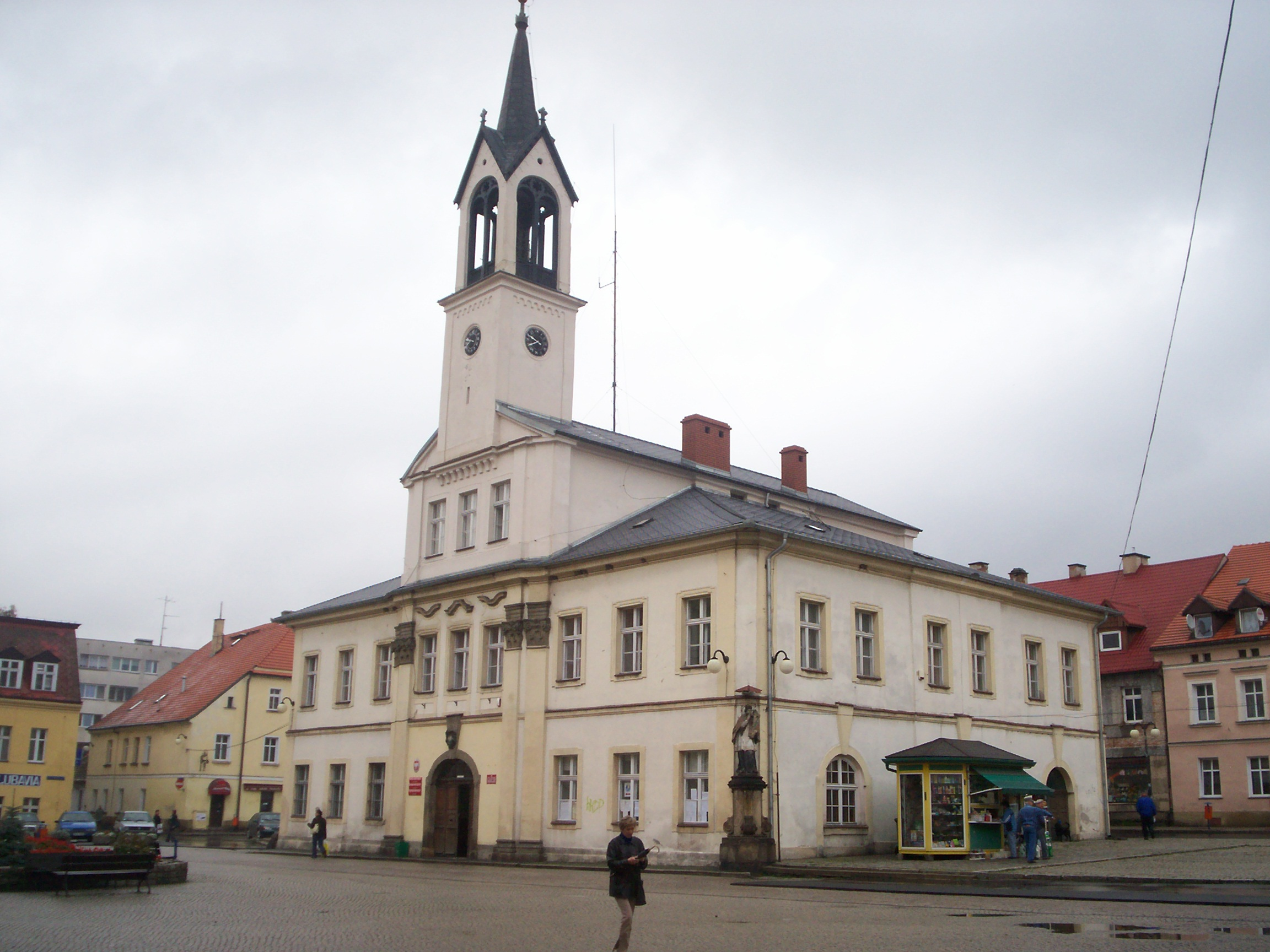 Polska. Powiat Kamienna Góra, miasto Lubawka, ratusz.